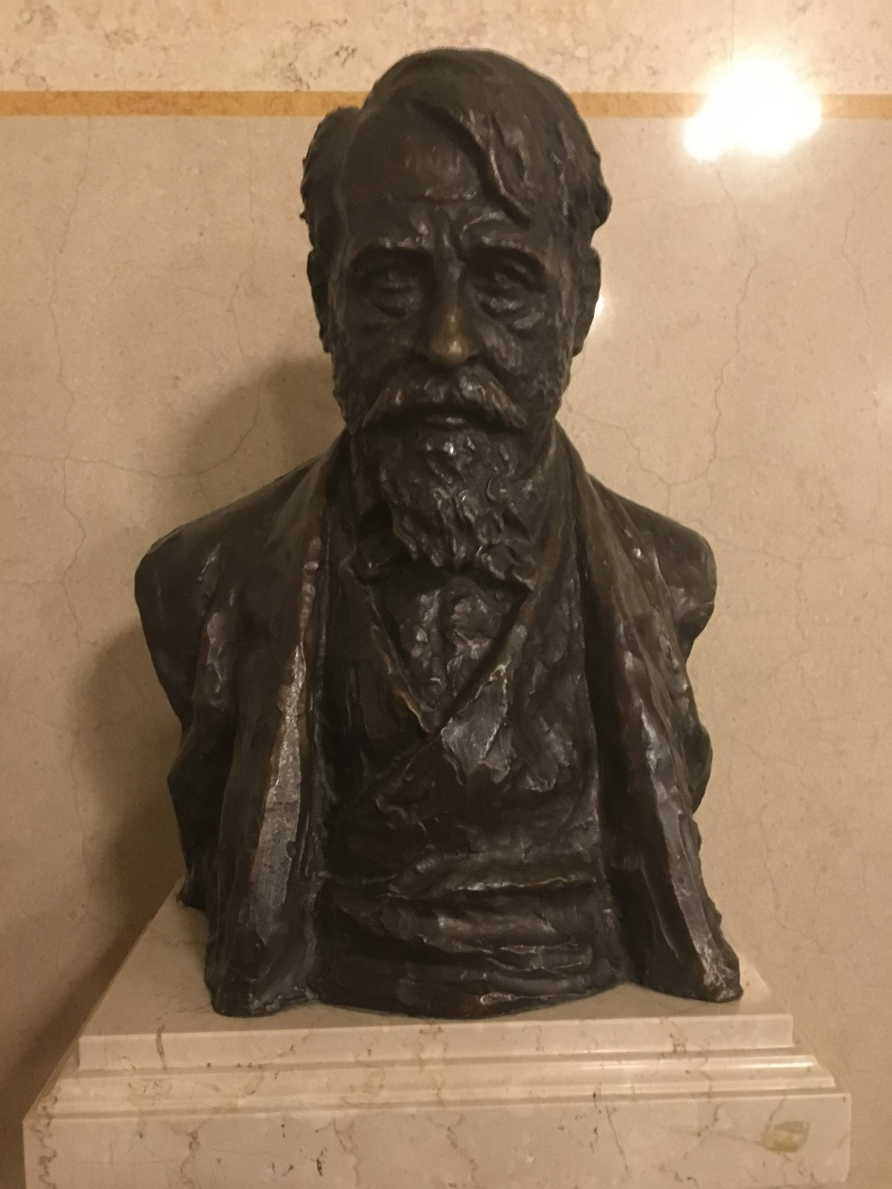 Büste von Arthur Schnitzler. Sie steht in der Galerie des Burgtheaters in Wien